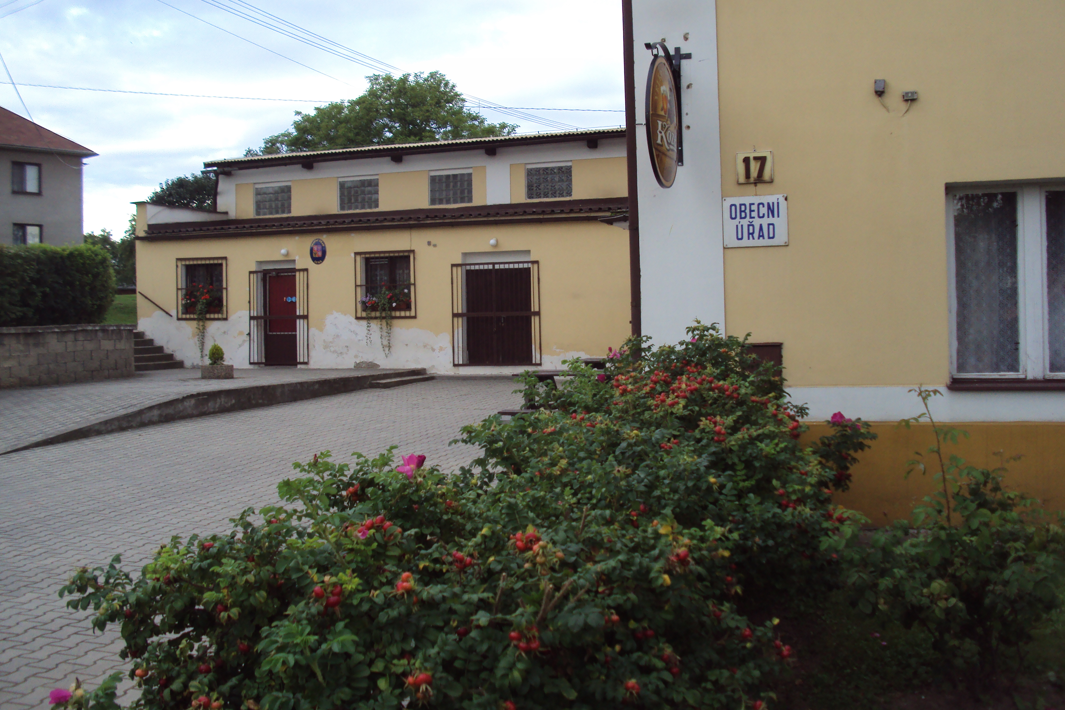 Obecní úřad na návsi